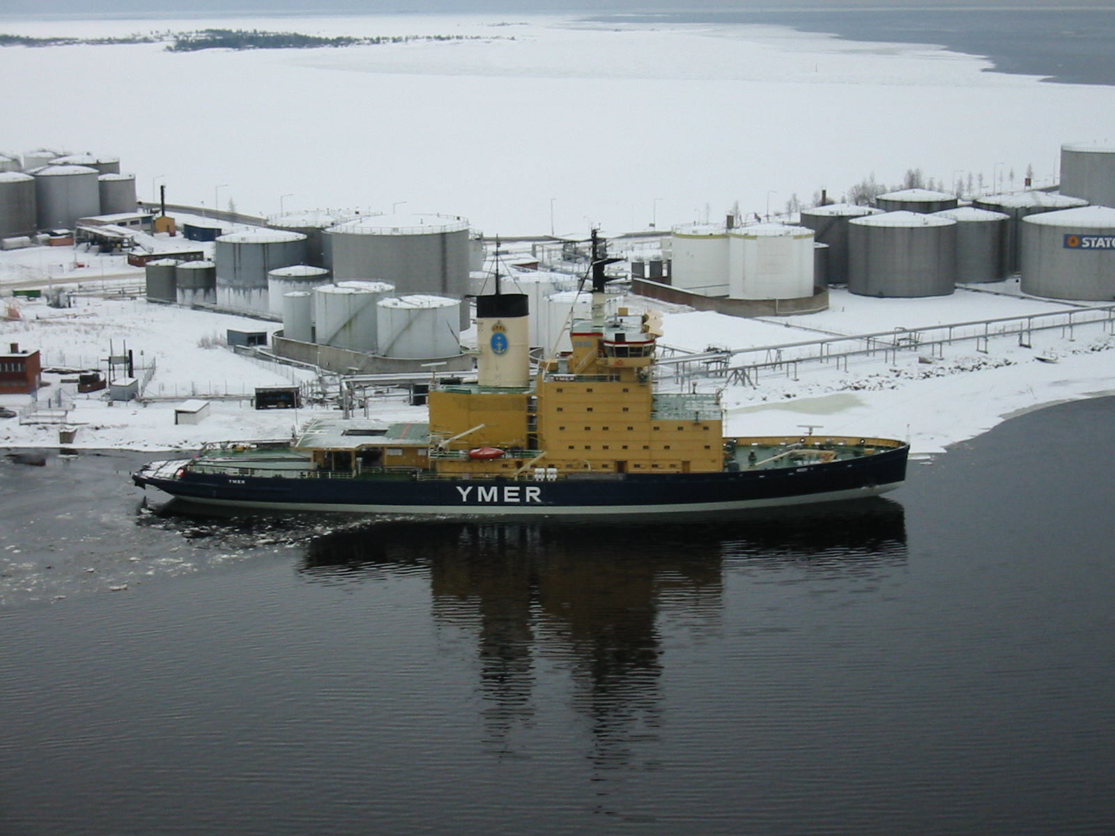 Ymer at oil jetty